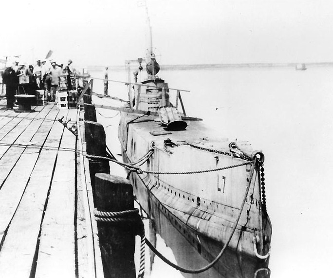 NH-81353 USS L-7 in port, circa 1917